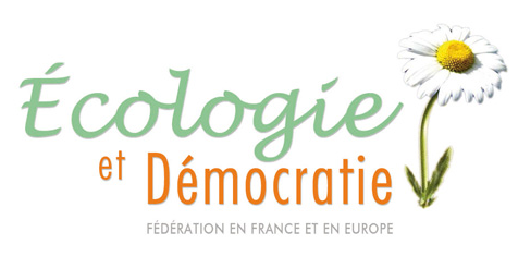 Logo de la Fédération Ecologie et Démocratie